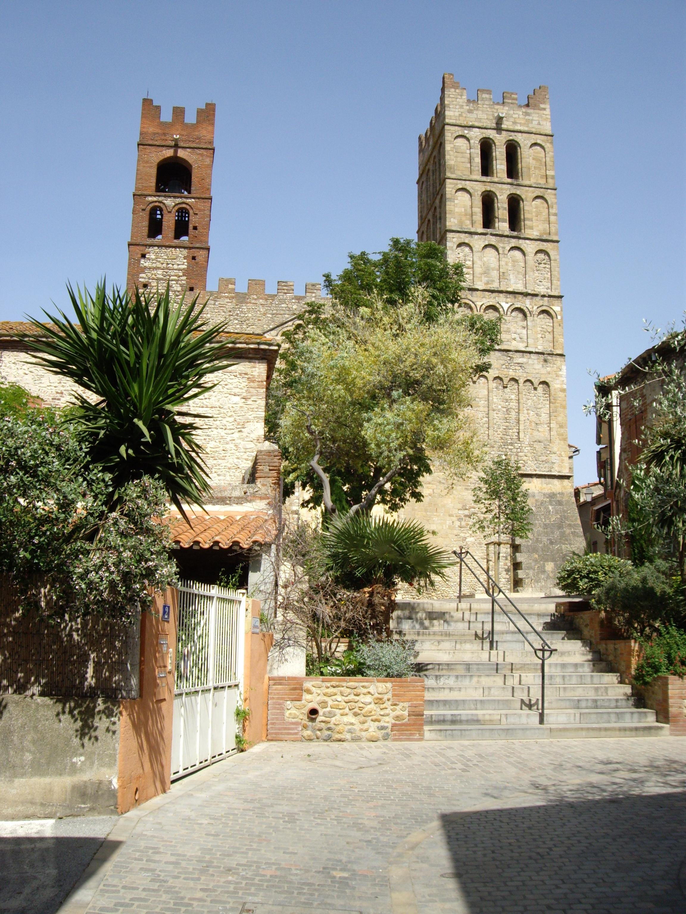 Cathédrale Sainte-Eulalie-et-Sainte-Julie (Elne, 66)